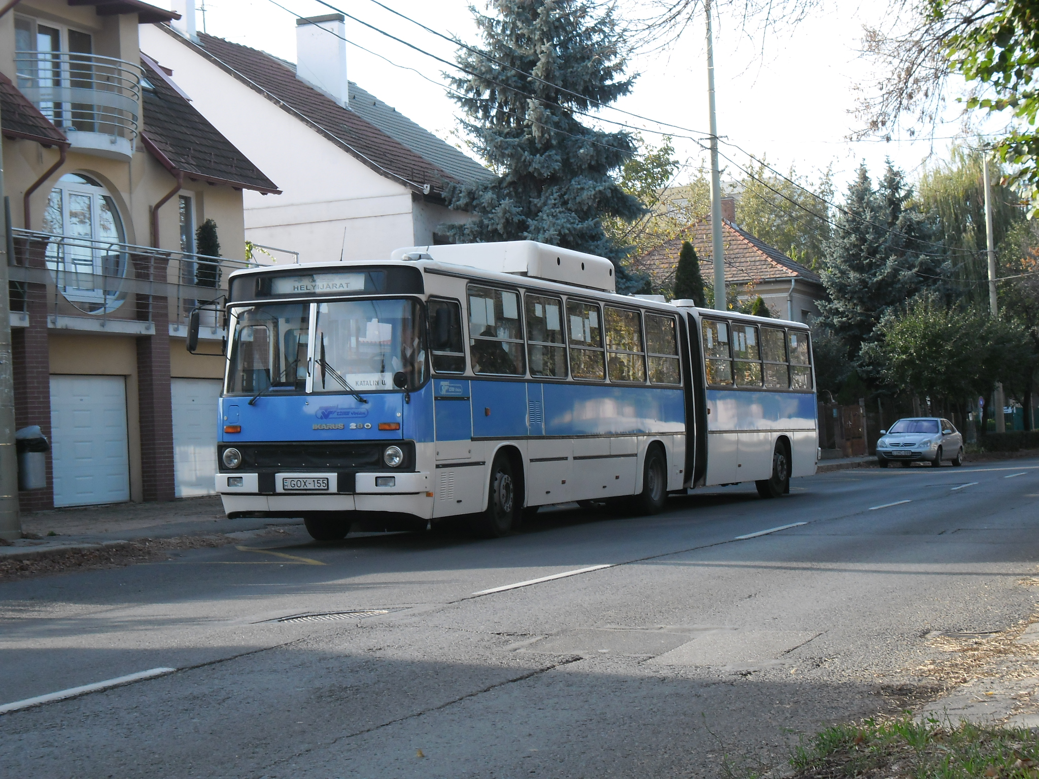 71-es busz - GOX-155